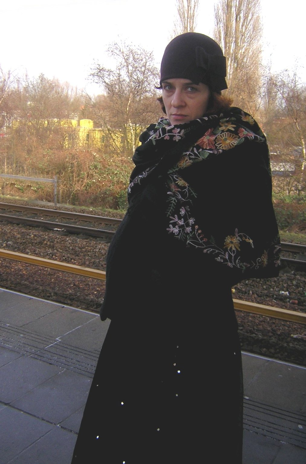 Nathalie Alonso Casale 2006.